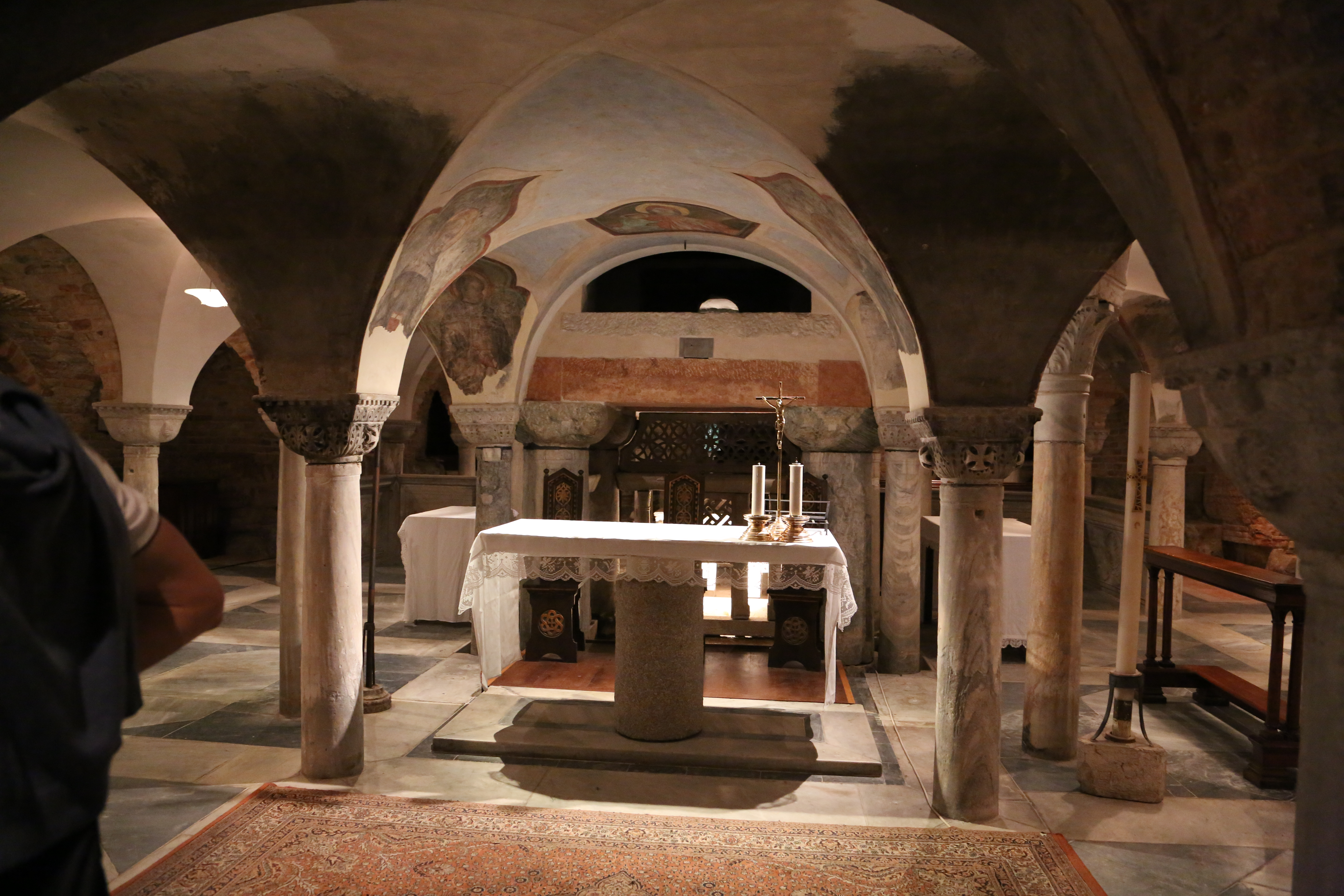 0O3A9701